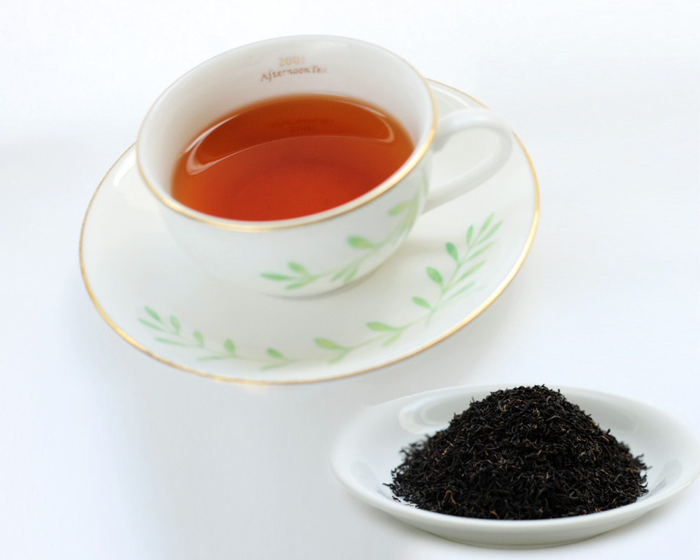 キームン紅茶